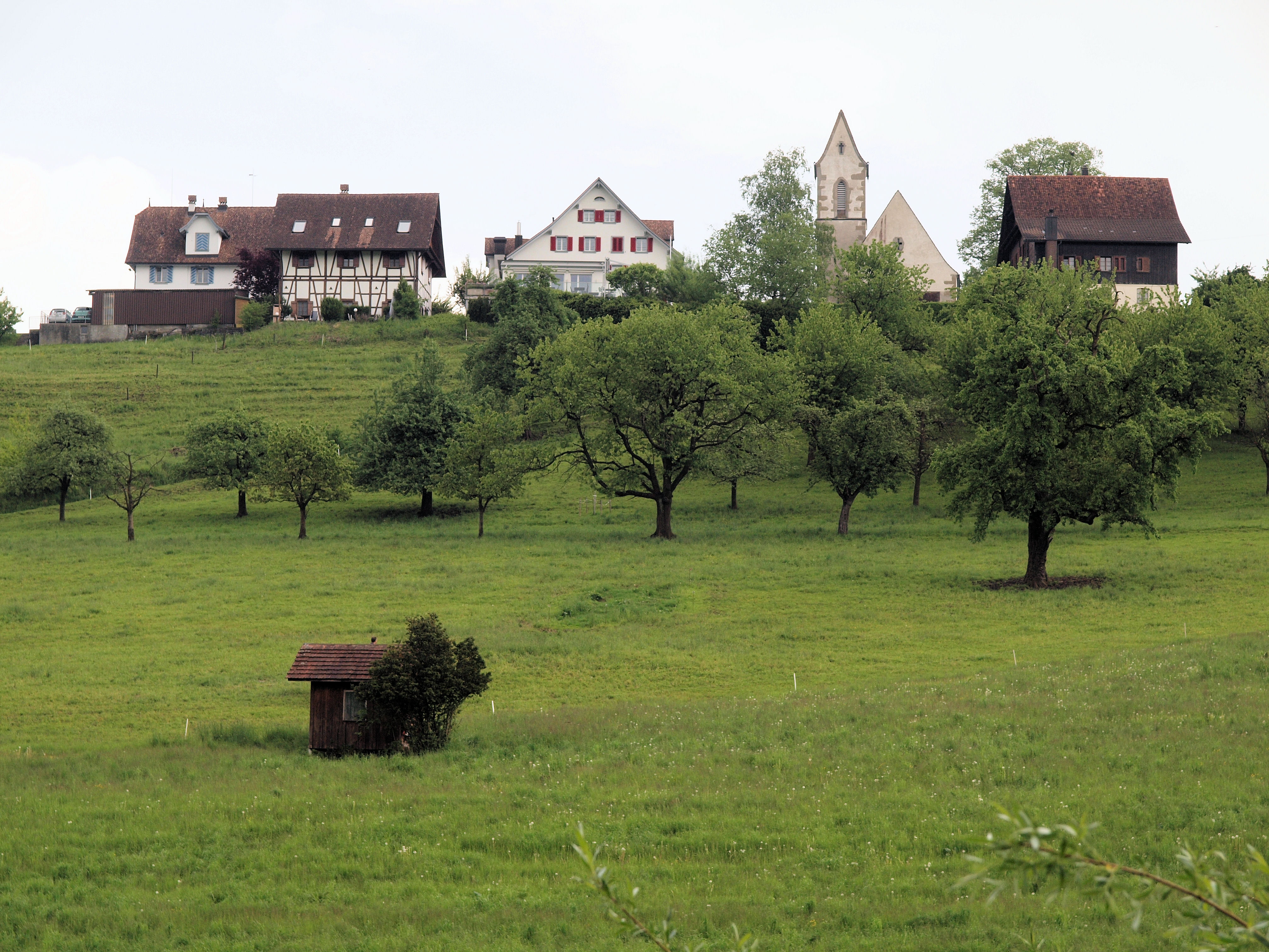 Ansicht der Siedlung St. Wolfgang (Gemeinde Hünenberg), von der am Fuss des Reussabhang gelegenen Riedhof